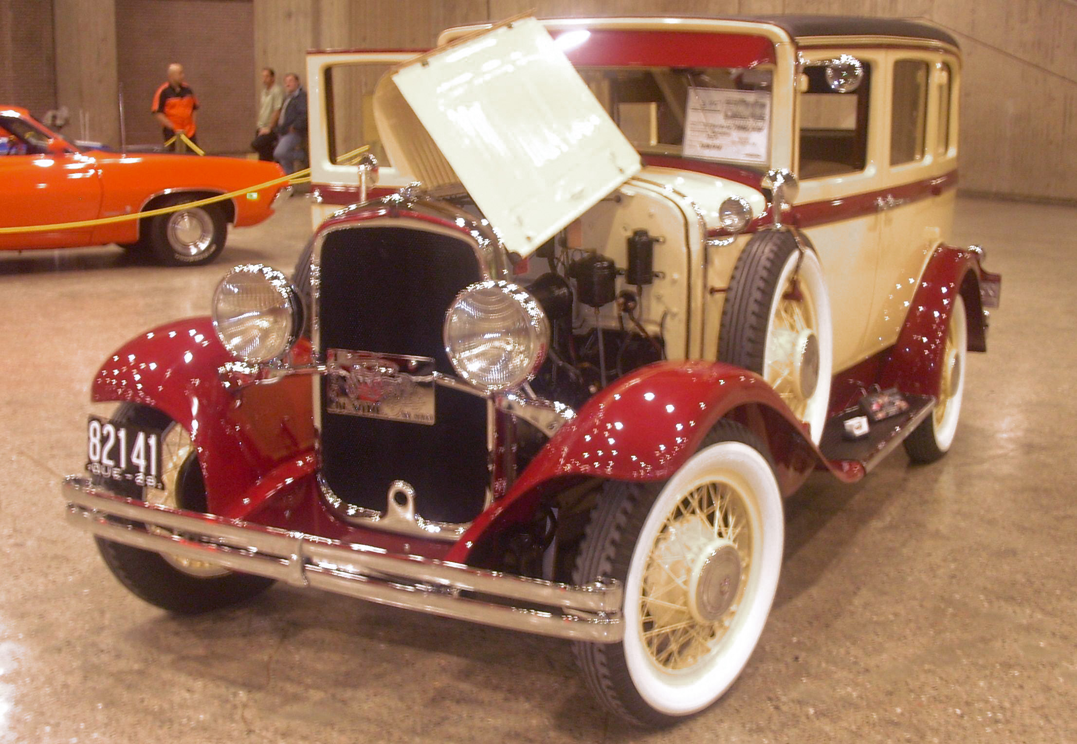 1929 DeSoto photographed at Auto classique Montréal 2008.